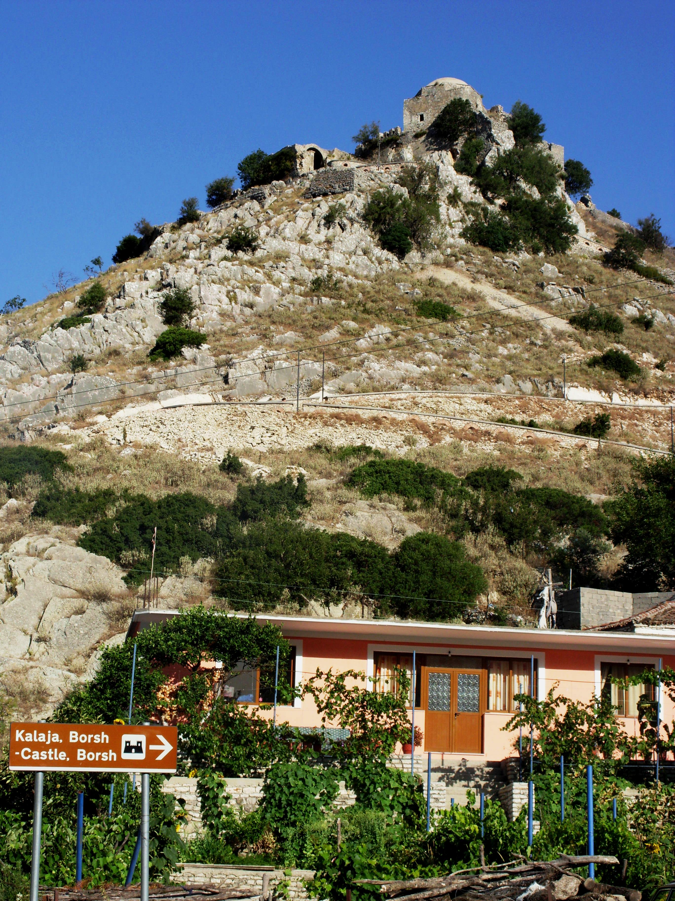 Burgberg von Borsh (Albanien)